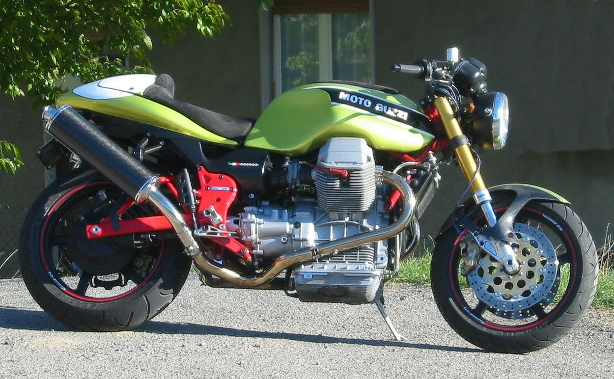 Moto Guzzi V11 Sport mit veränderter Gabel, anderer Auspuffanlage, individueller Lackierung und veränderter Radabdeckung hinten